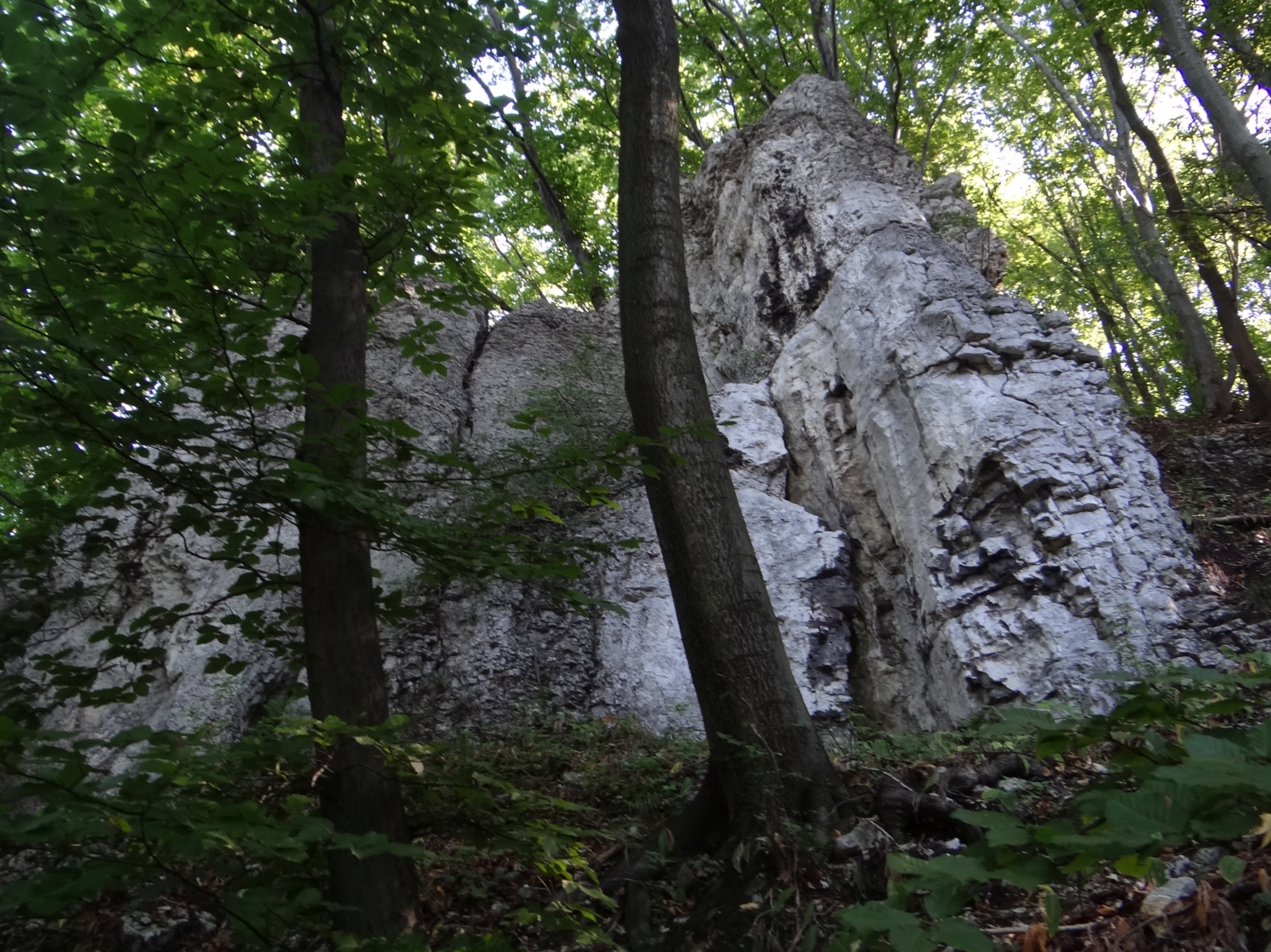 Skała poniżej Skały nad Źródłem w Dolinie Będkowskiej